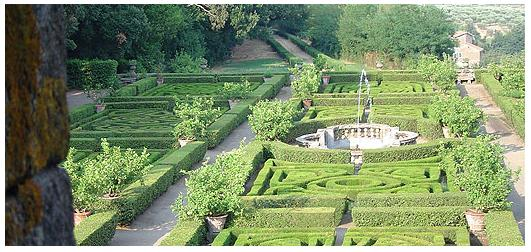 Giardino